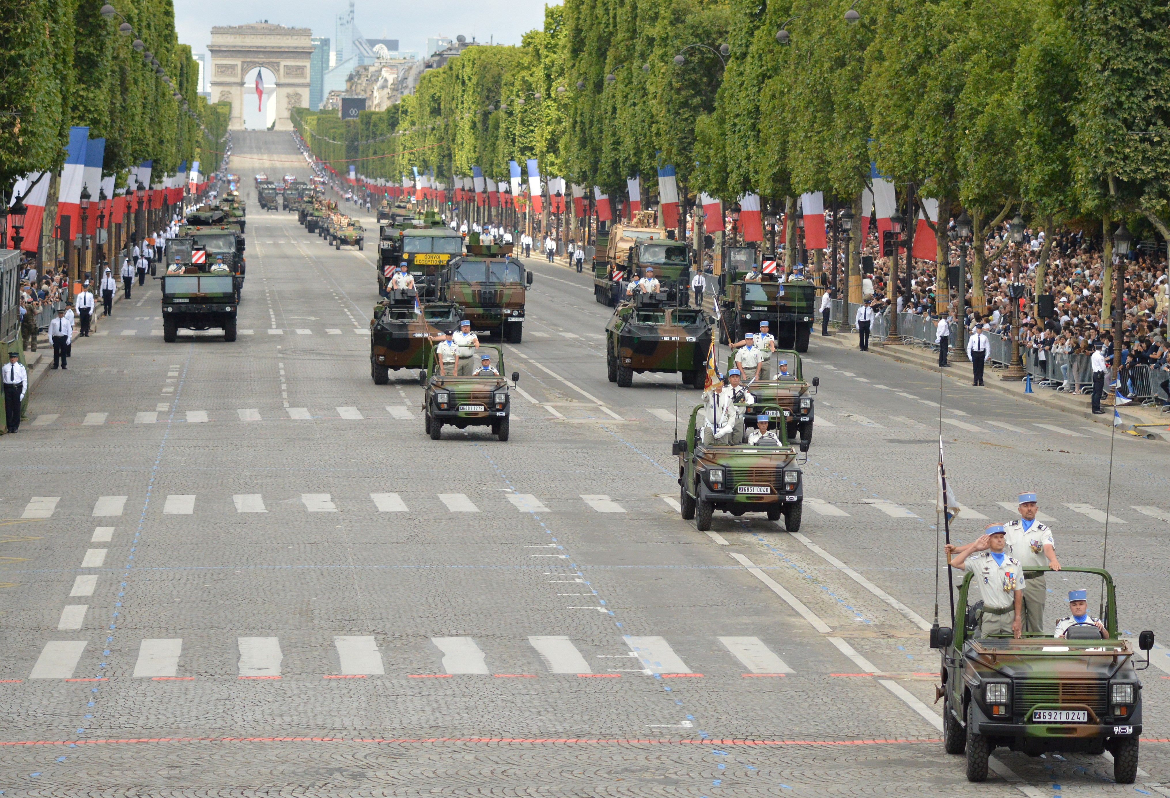 défilé du 14 juillet 2017 - champs élysée